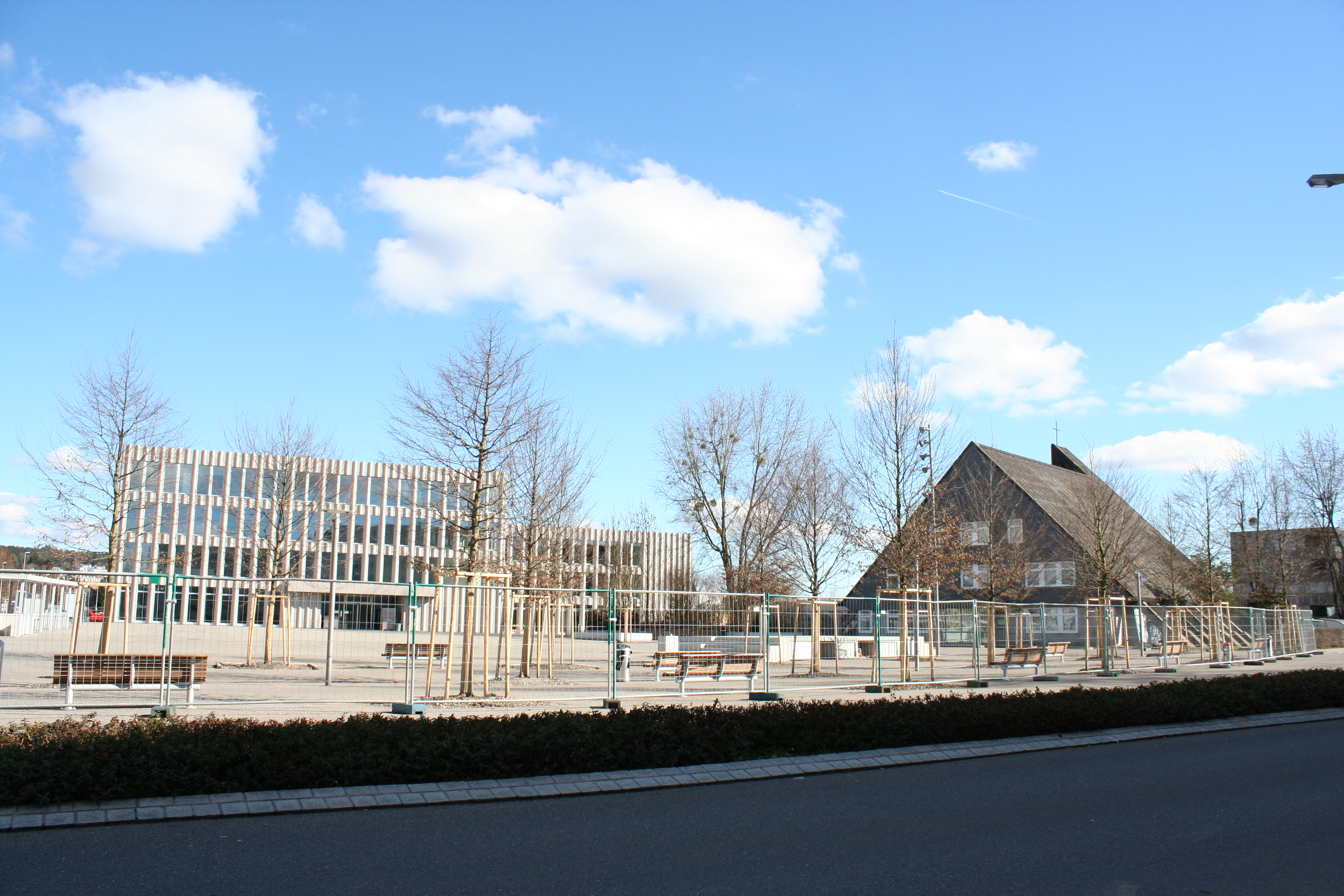 Römisch-katholische Kirche Bruder Klaus Volketswil